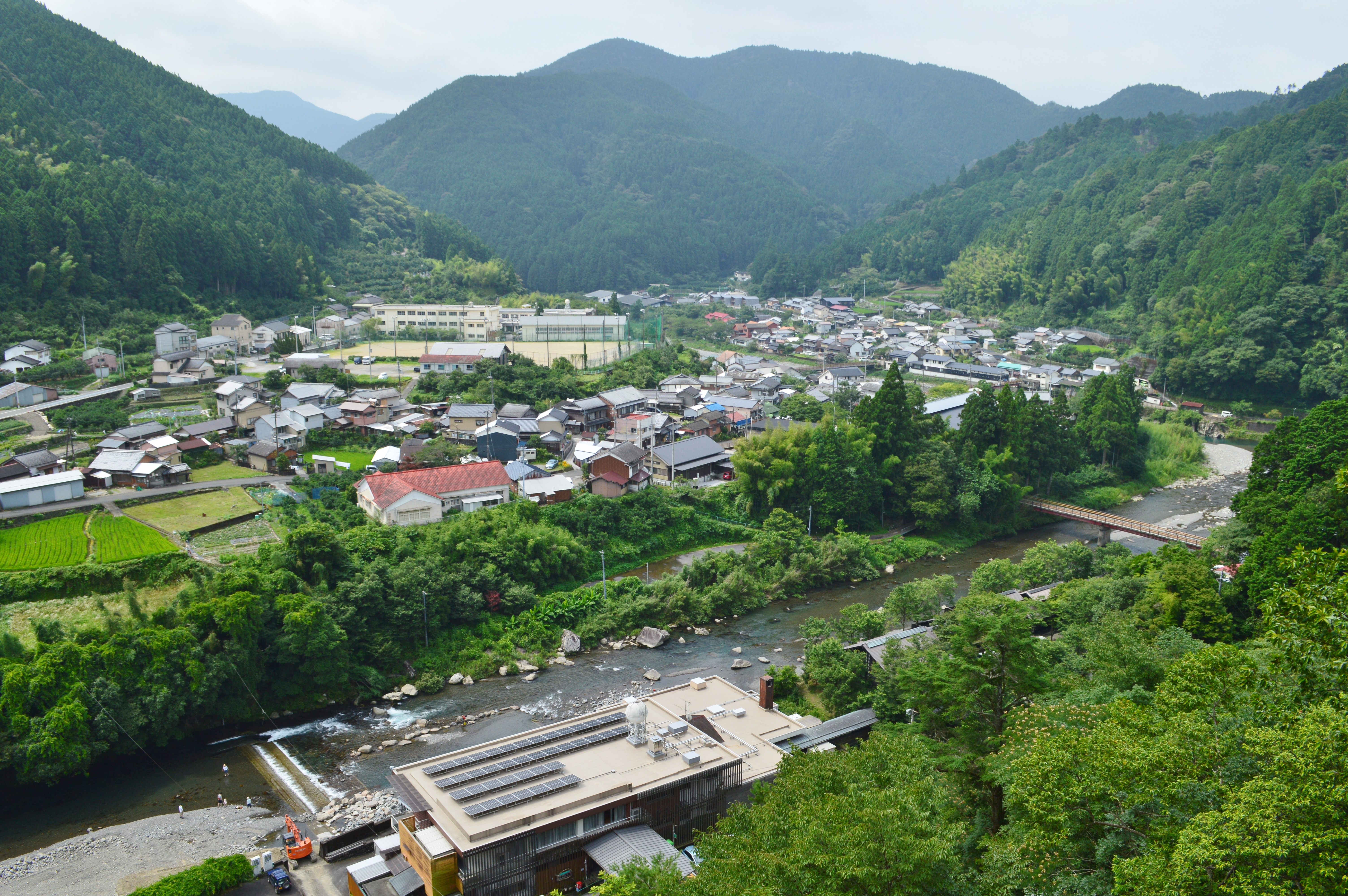 馬路村馬路地区 全景